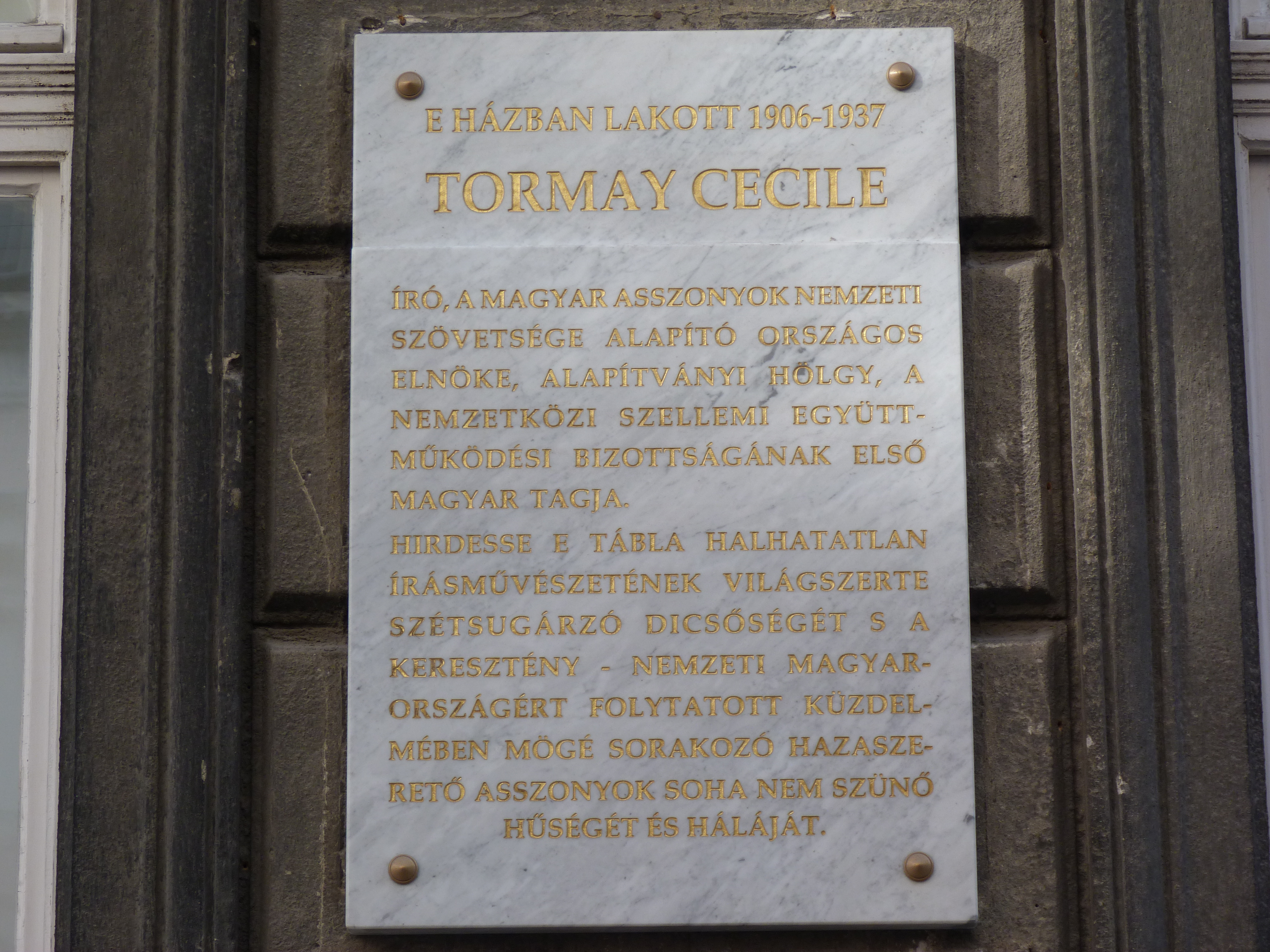 Tormay Cécile a közeli Kőfaragó utca 3-as szám alatti házban lakott (Józsefváros), ahol a közelmúltban helyreállították 1945-ben elpusztított emléktábláját